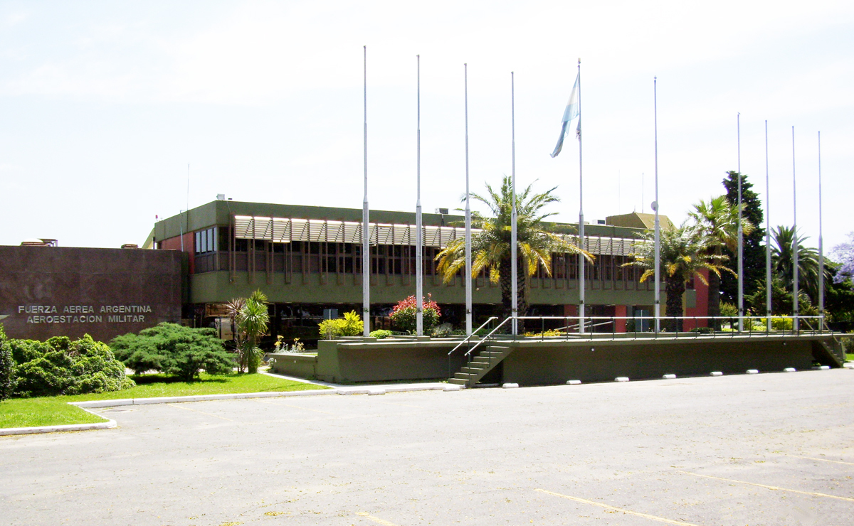 Aeroestación Militar de la Fuerza Aérea Argentina en el Aeroparque Jorge Newbery.